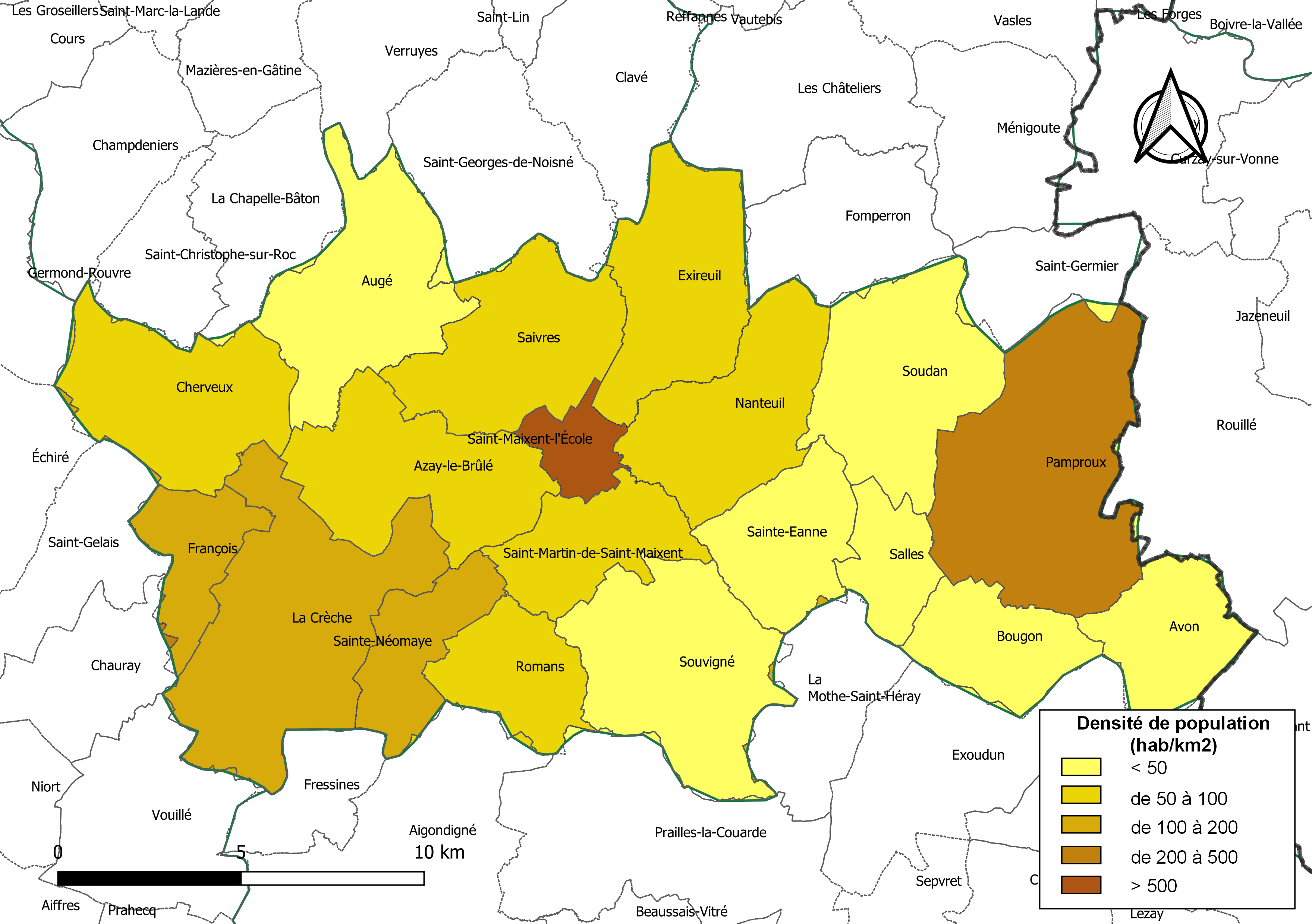 Carte des densités de population (millésimée 2016) des communes de la Communauté de communes Haut Val de Sèvre, département des Deux-Sèvres, France. Composition au 1er janvier 2019.